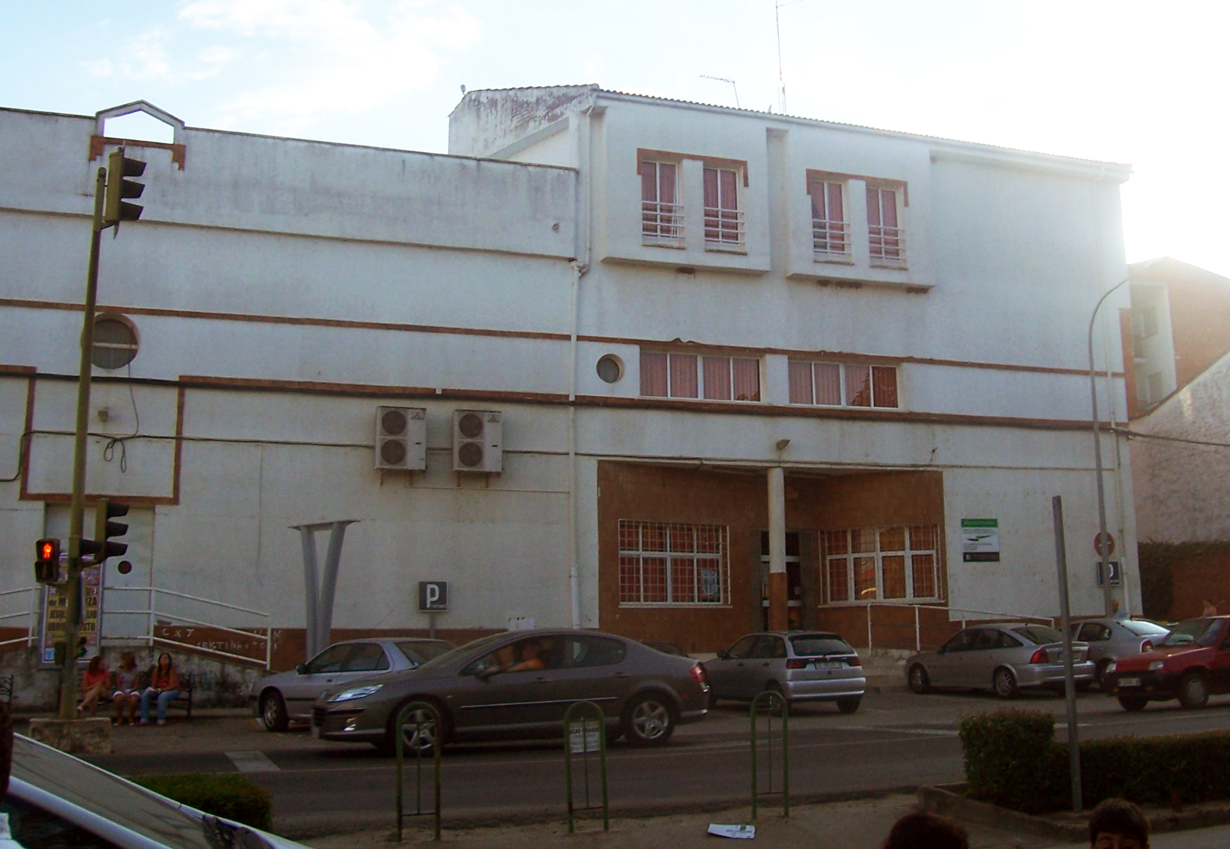 Casa de la cultura de Montehermoso, Cáceres, España (2007)